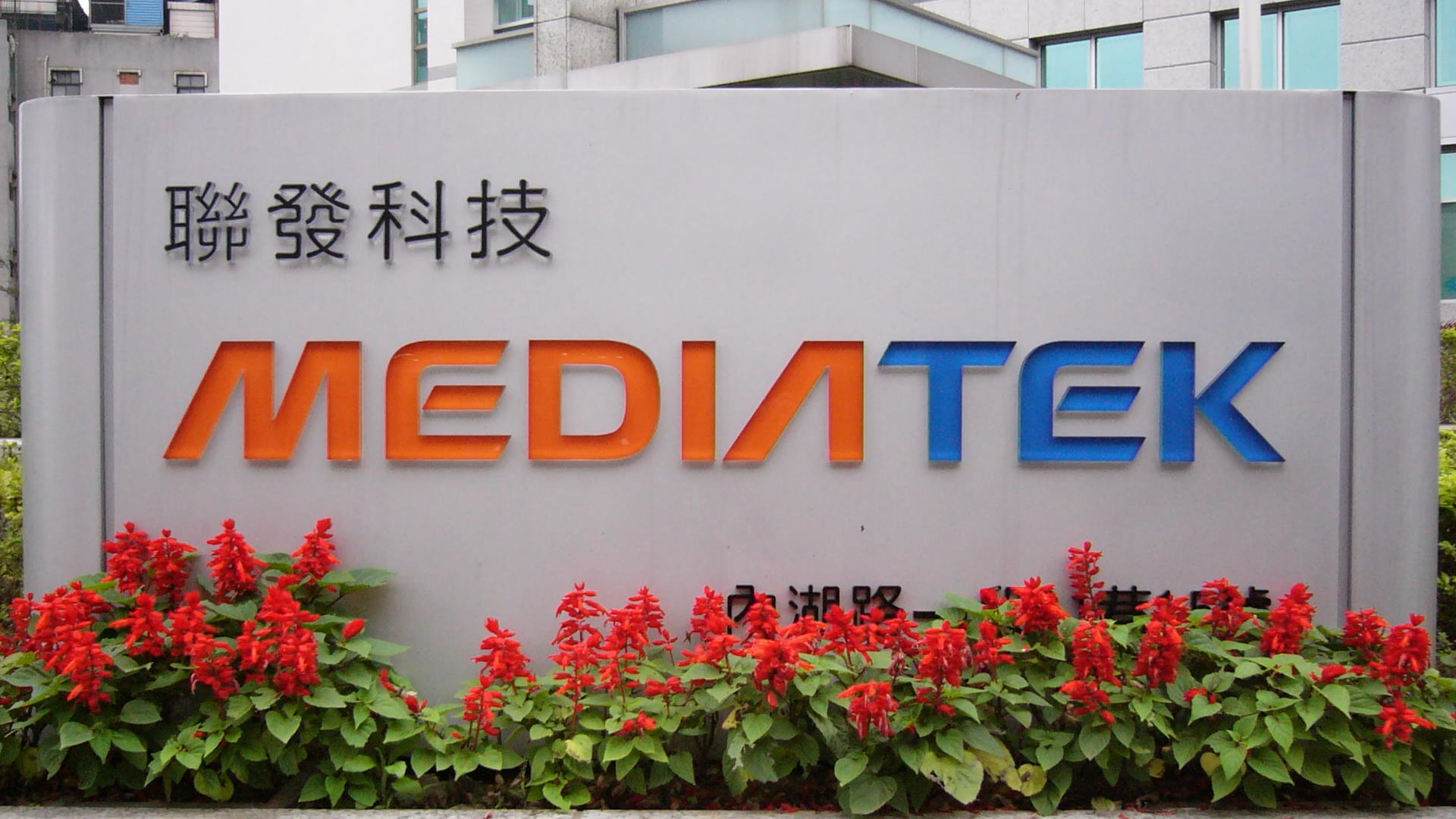 臺北市內湖區內湖路一段91巷「太陽科技廣場」C棟前，聯發科技台北分公司立牌。